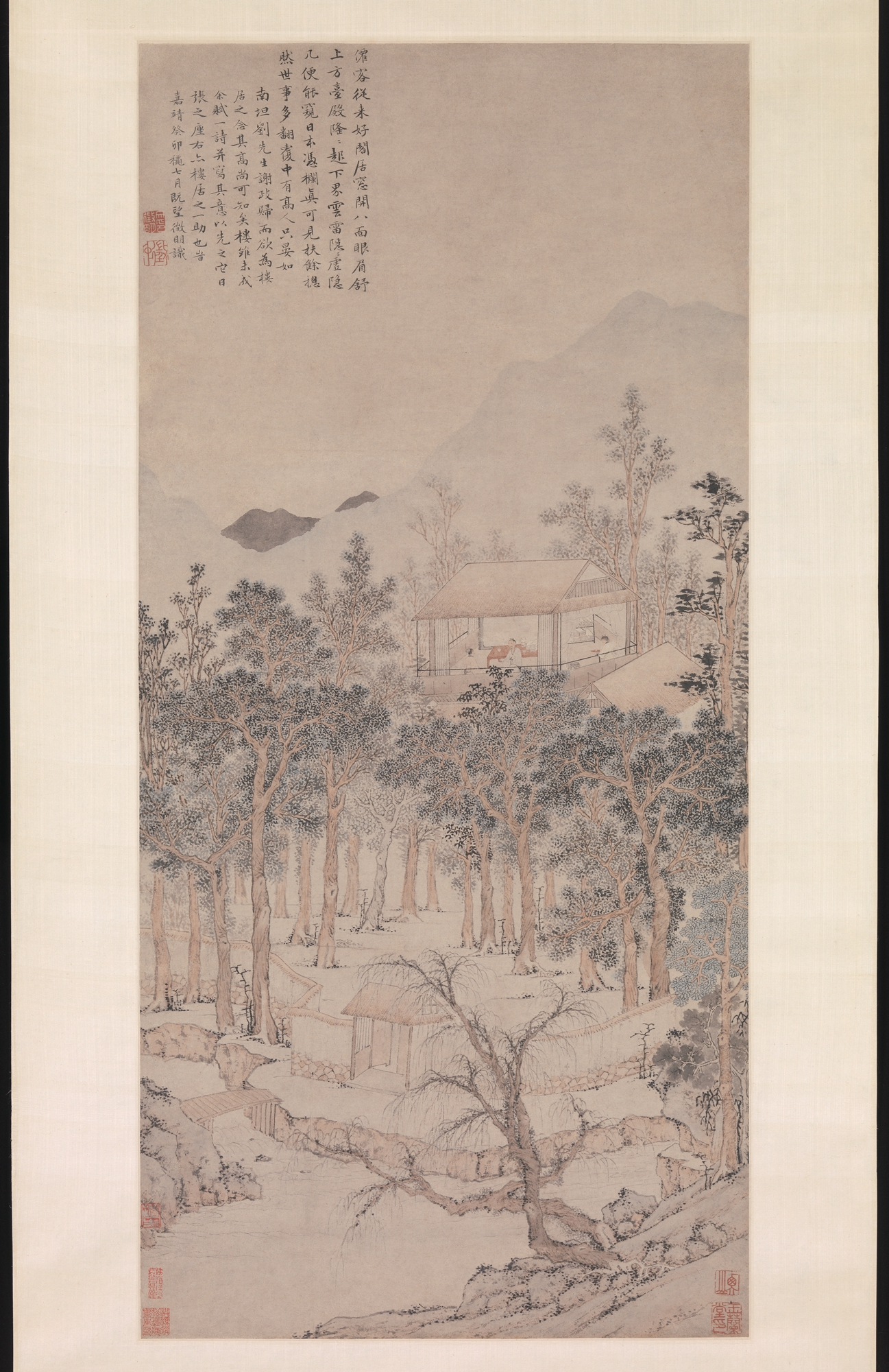 China; Hanging scroll; Paintings